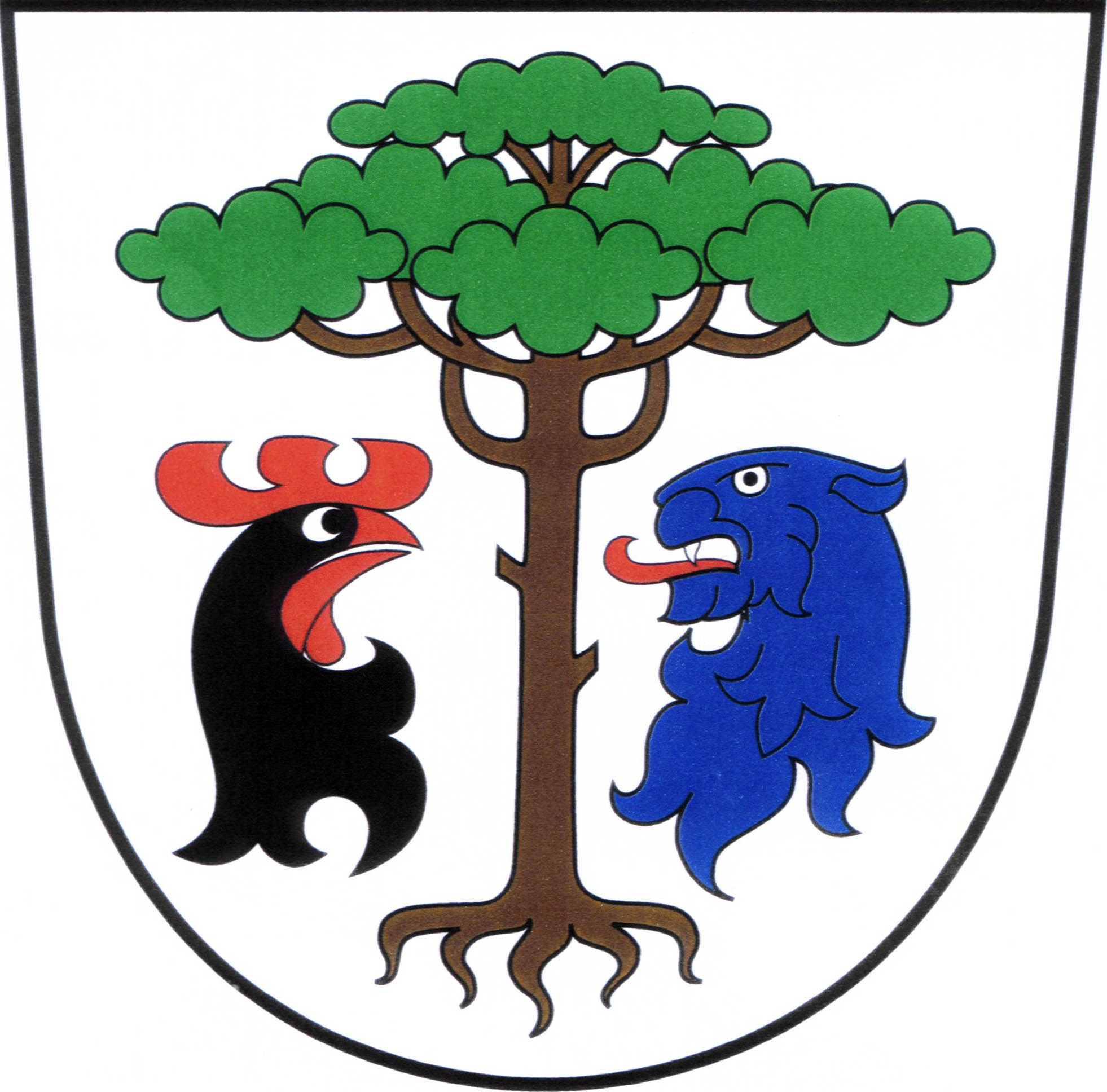 Česky: znak obce Borovnice